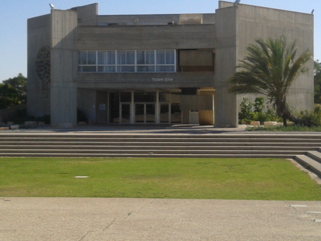 אולם המופעים על שם שמואל שילה במתחם המועצה האזורית אשכול. אדריכל: חנן הברון